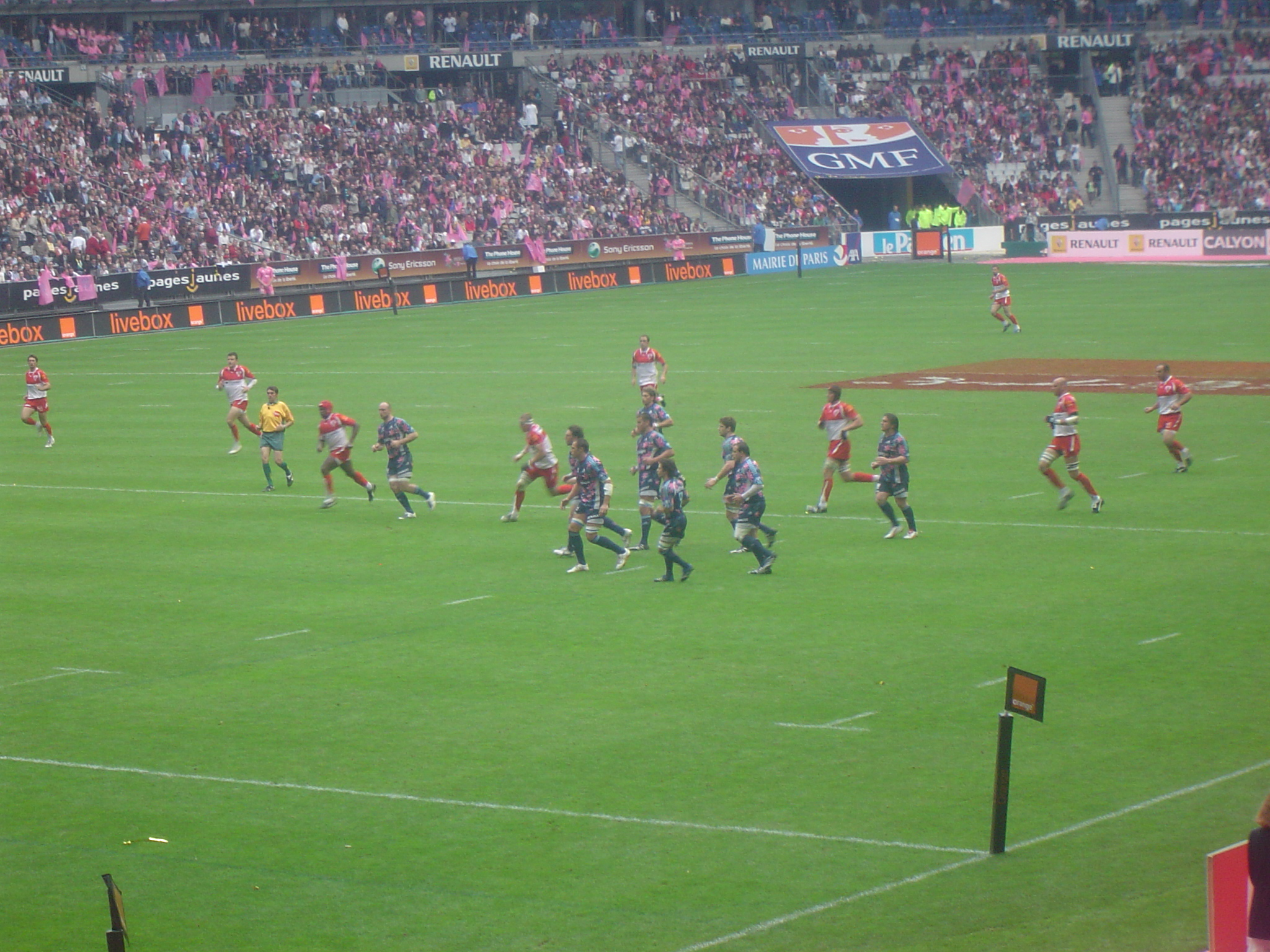 25e journée du championnat de France de rugby Top 14 en 2007-08 - Stade Français vs Biarritz Olympique